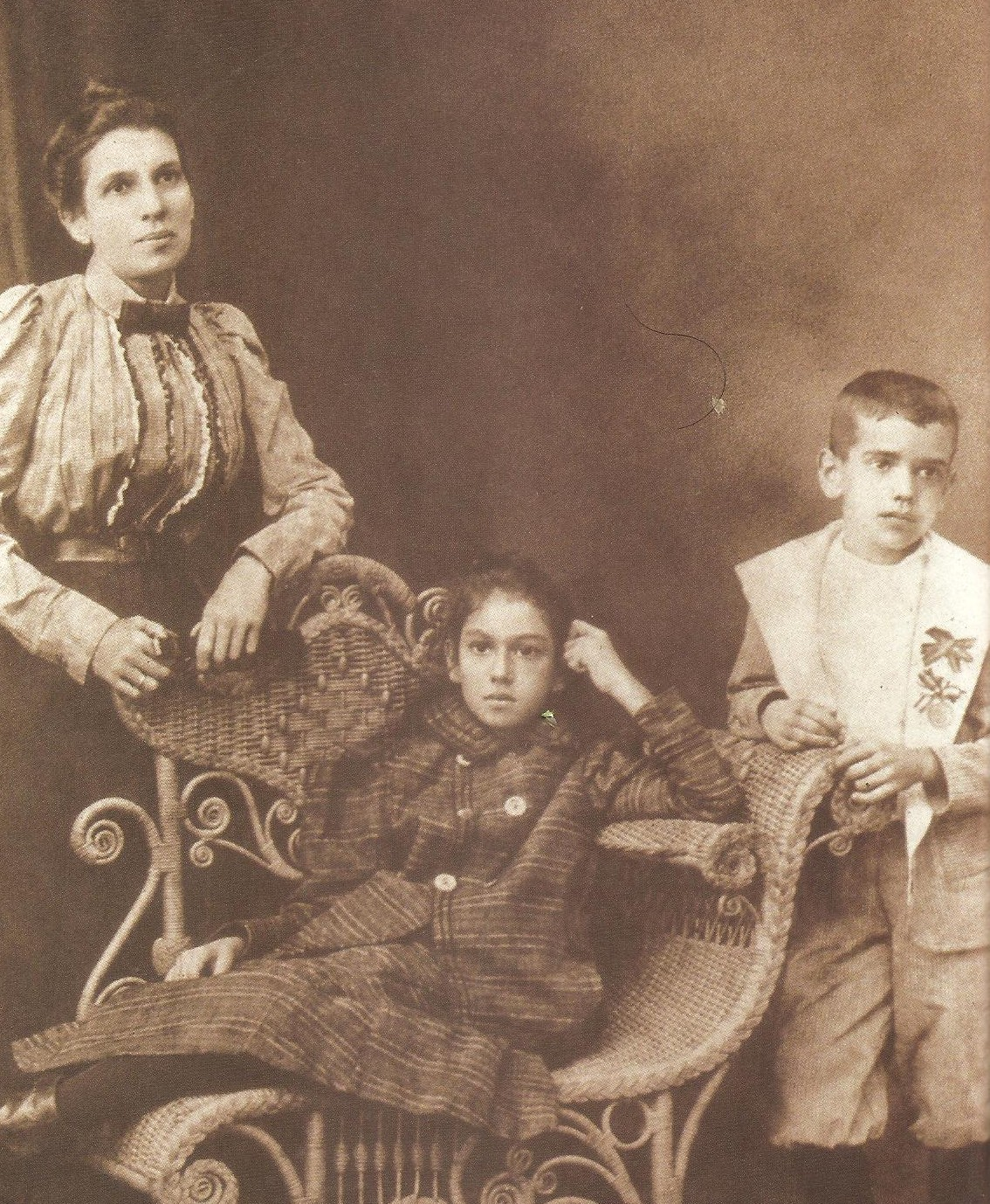 Ruiz Cortines (1889-1973) político mexicano, presidente de México en el periodo de 1952-1958, con su madre María Cortines y su hermana del mismo nombre.